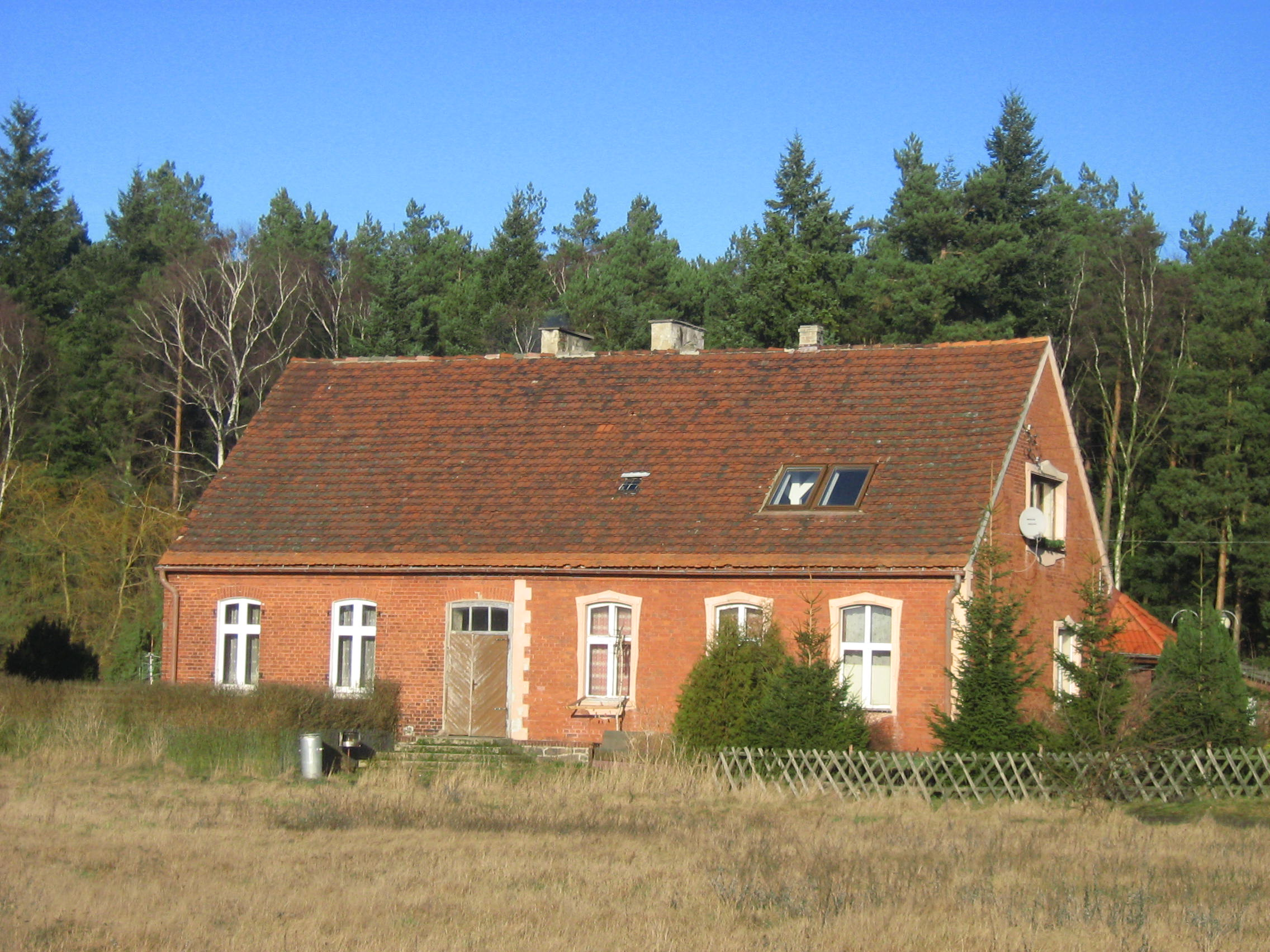 Dom we wsi o numerze 43. Dawniej znajdowała się tu szkoła podstawowa.